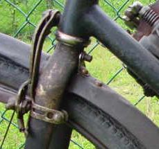 Velgrem op een Clément uit 1904.